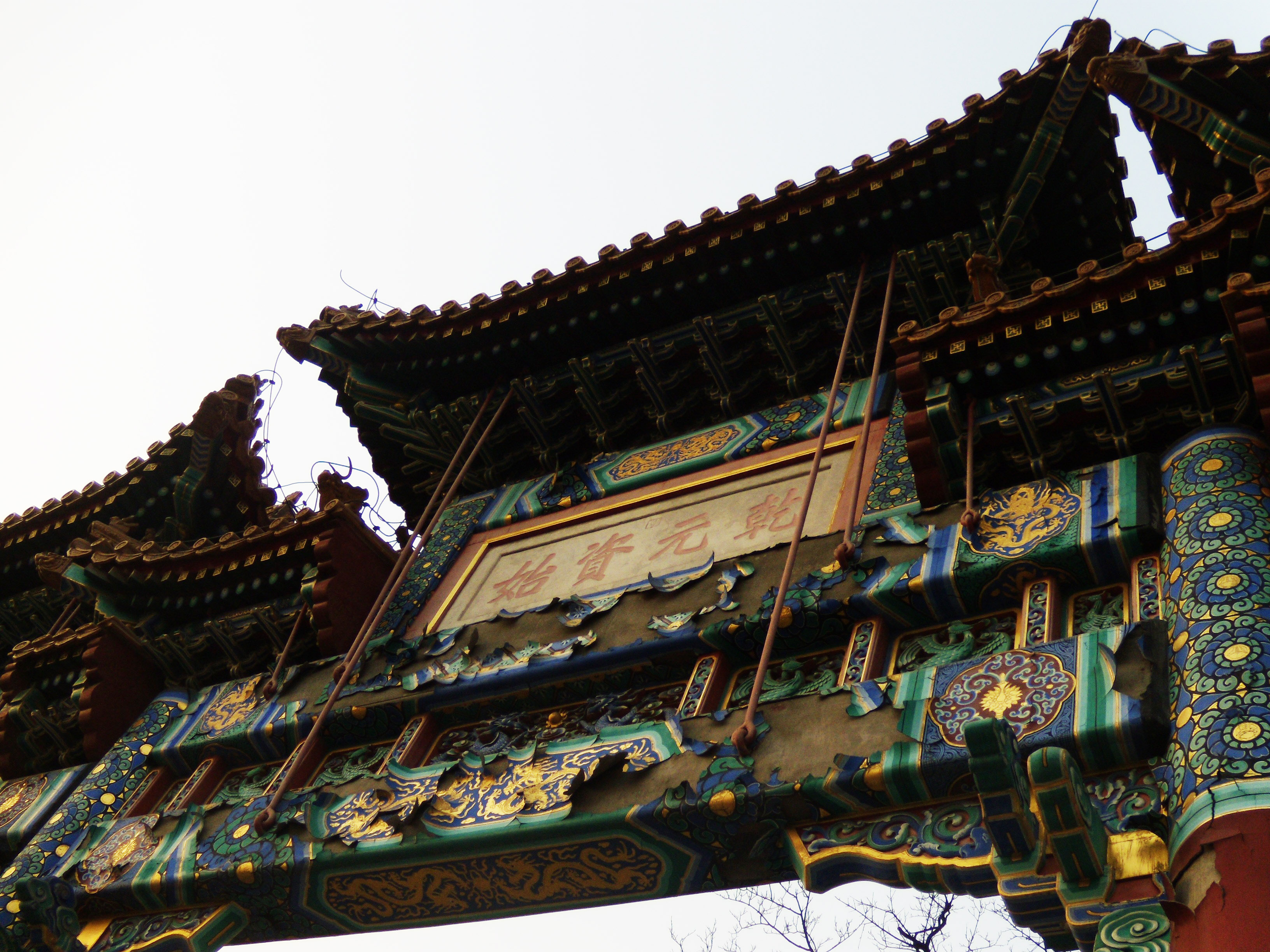 大高玄殿南牌楼南侧